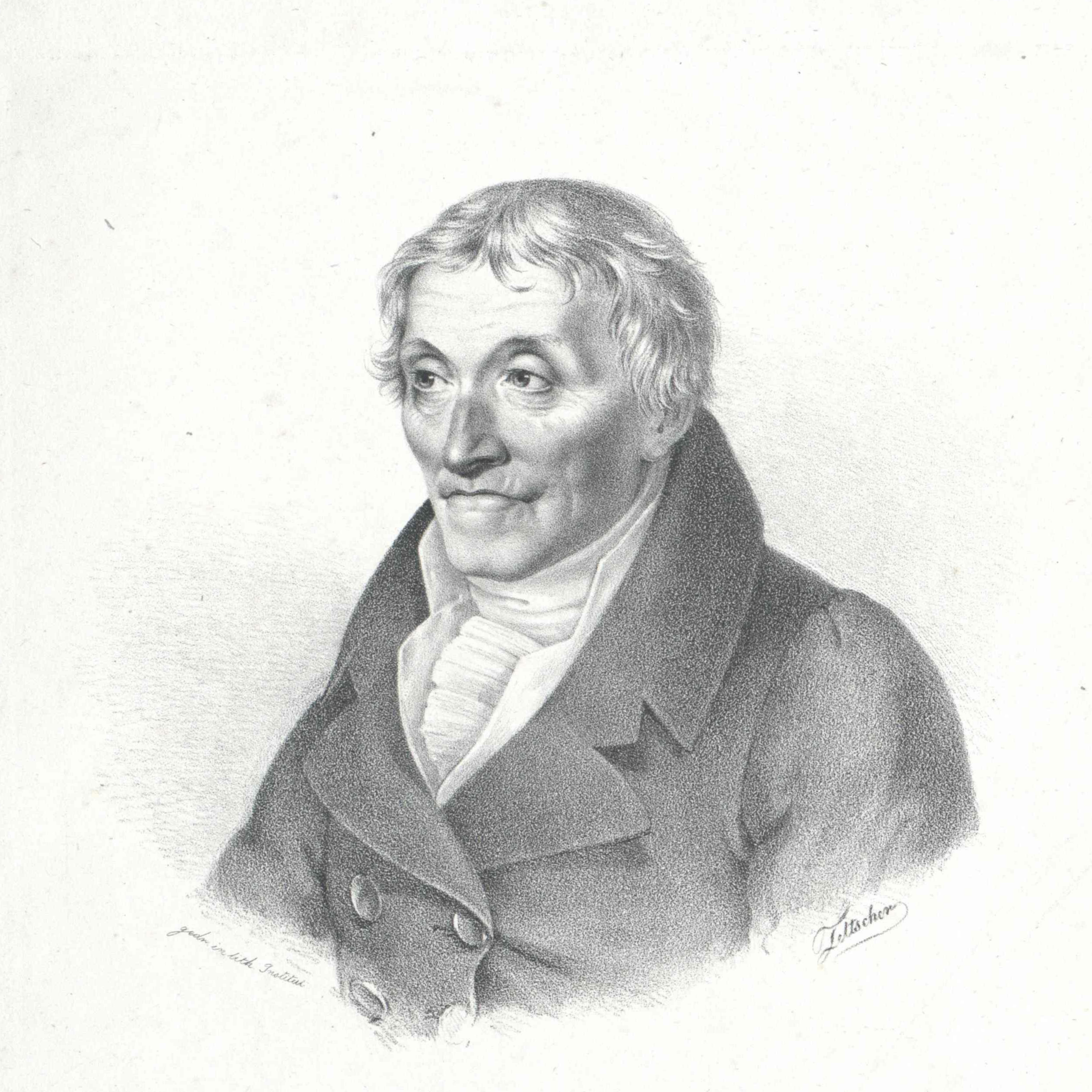 Emanuel Aloys Förster, Lithographie von Josef Eduard Teltscher, 1820